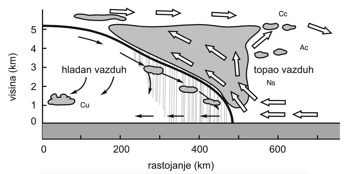 Српски (ћирилица): Хладни фронт првог реда